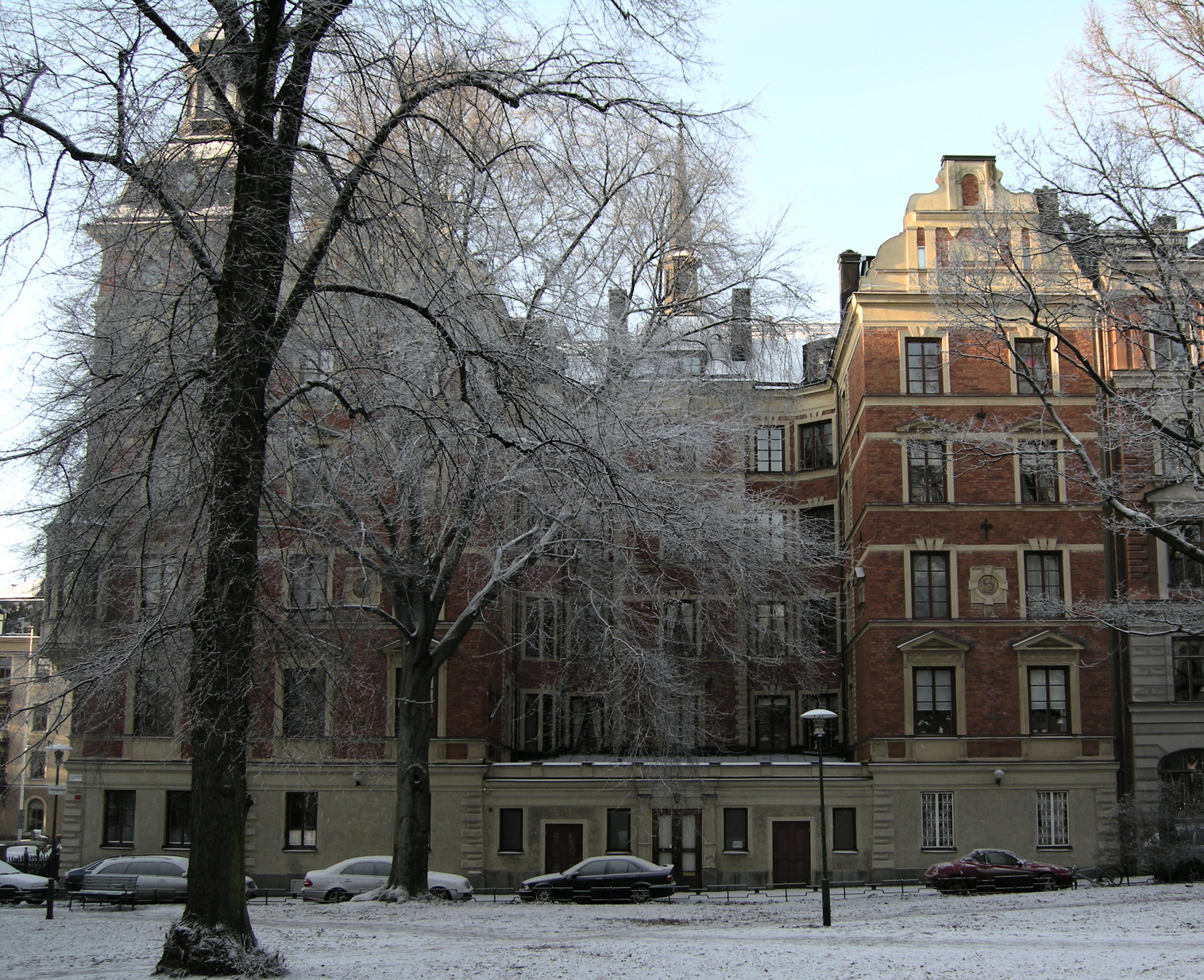 Rosenborgshuset från 1883 sett från Stureparken. Arkitekt: Ferdinand Boberg.